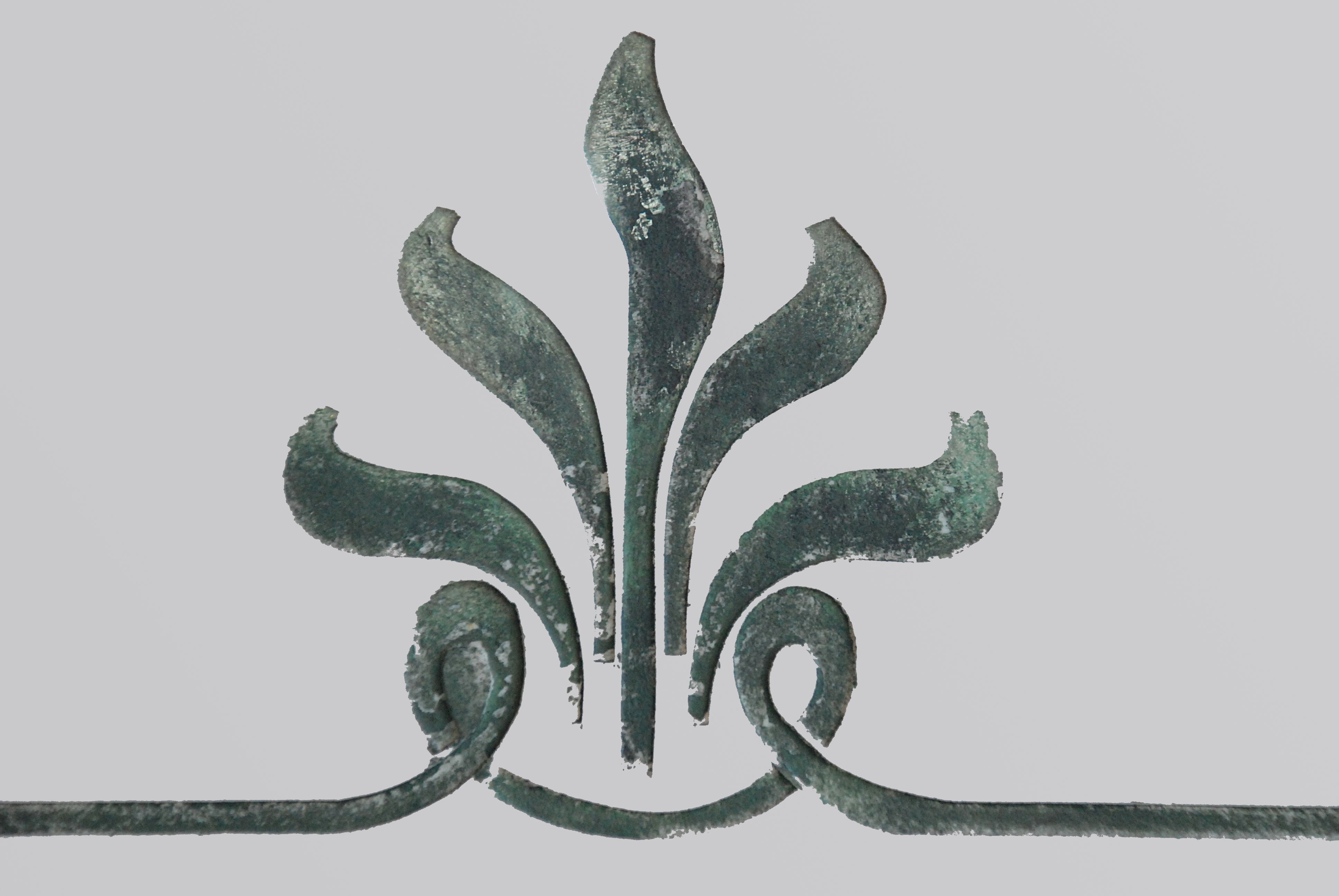 Léon Govaerts - Siège de la Gresham Life Assurance Society Limited, Place Royale à Bruxelles (Art nouveau; 1903)